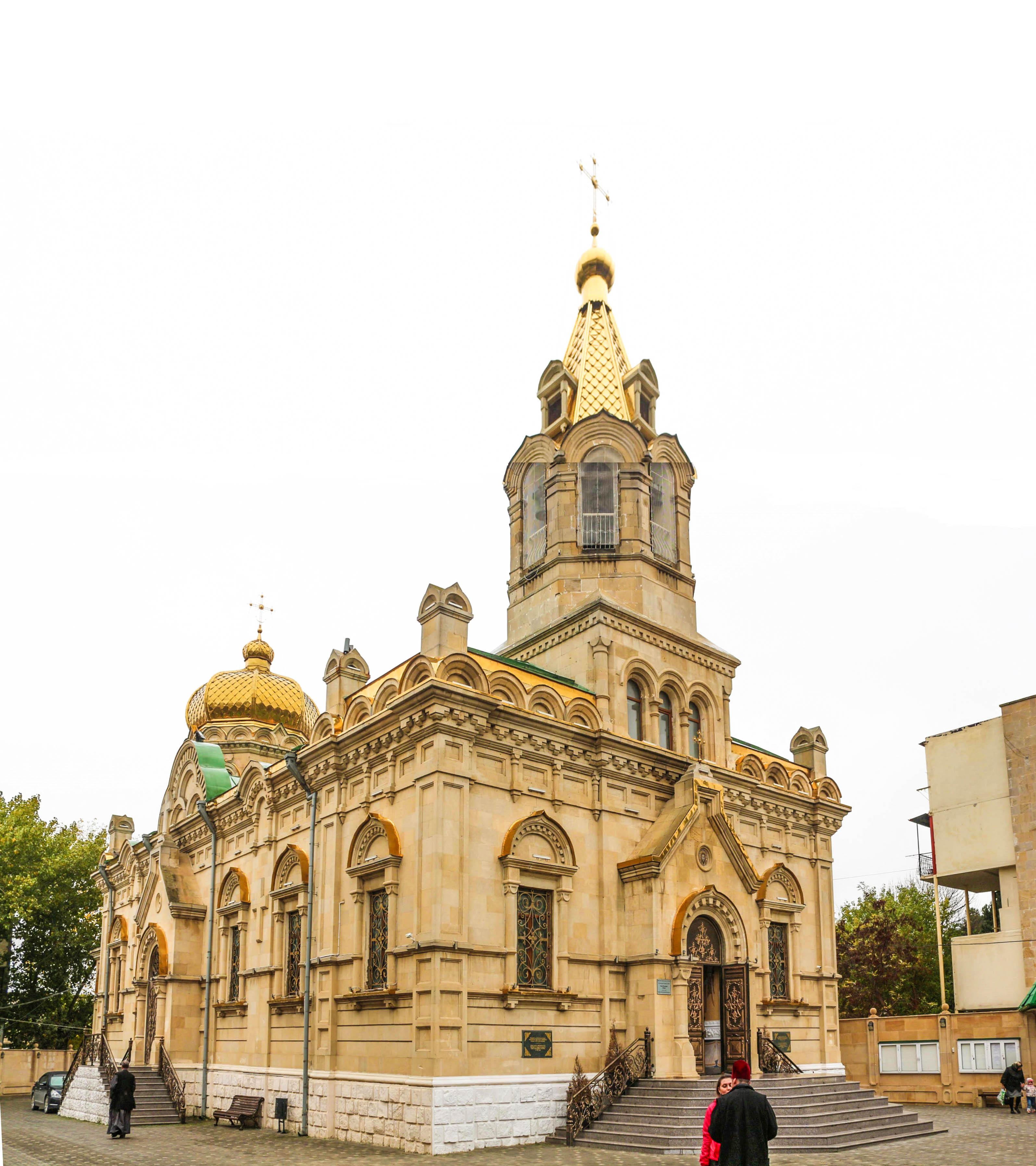 Müqəddəs Mürdaşıyan Zənənlər Kafedralı